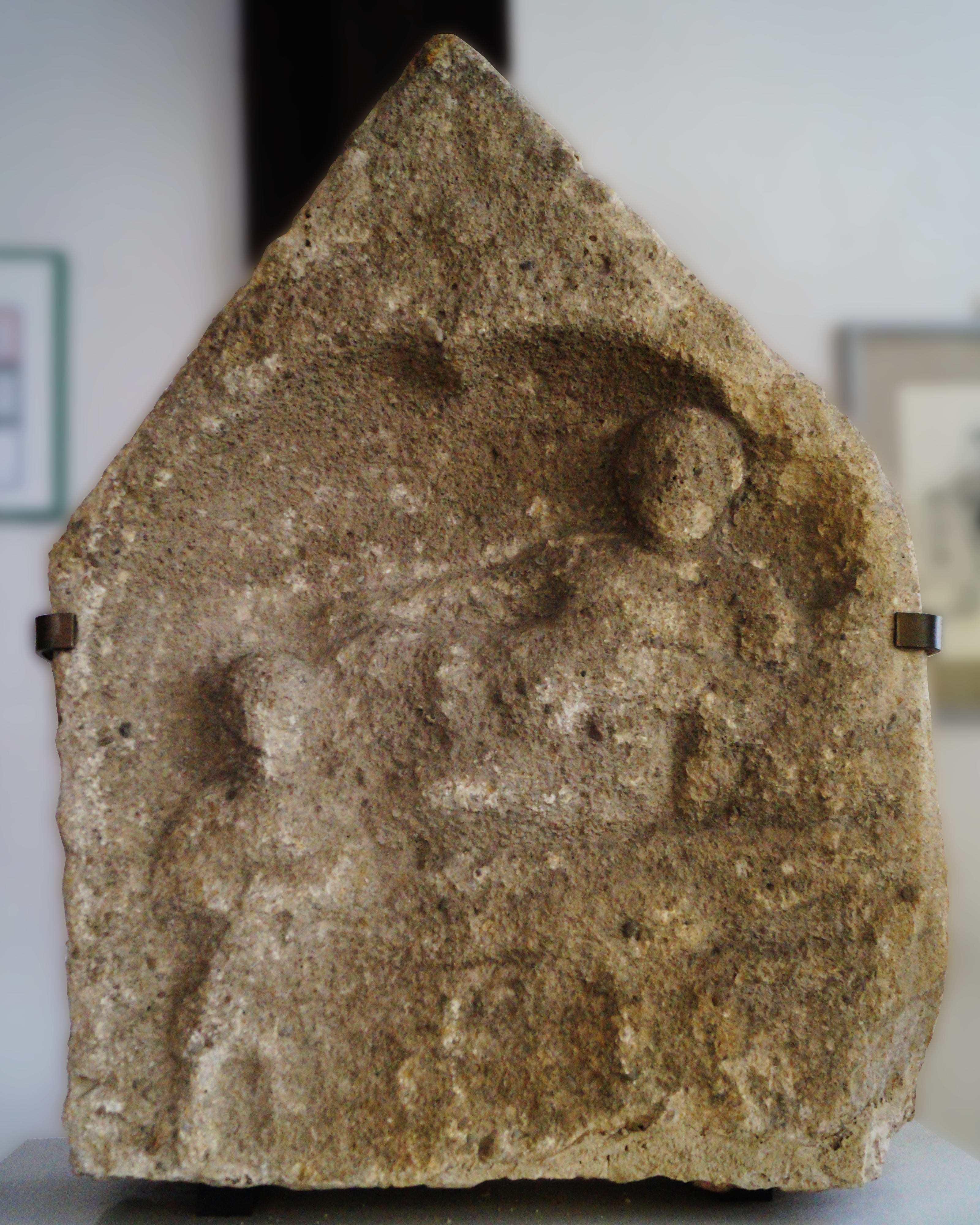 Römischer Grabstein mit Darstellung eines Totenmahls, Fundort: Gräberfeld des Limeskastells Echzell, Echzell-Gettenau, Wetteraukreis in Hessen. Ausstellung im Heuson-Museum Büdingen. Literatur: Werner Jorns: Ein römischer Grabstein in Gettenau. In: Büdinger Geschichtsblätter 2, 1958, S. 15–18.